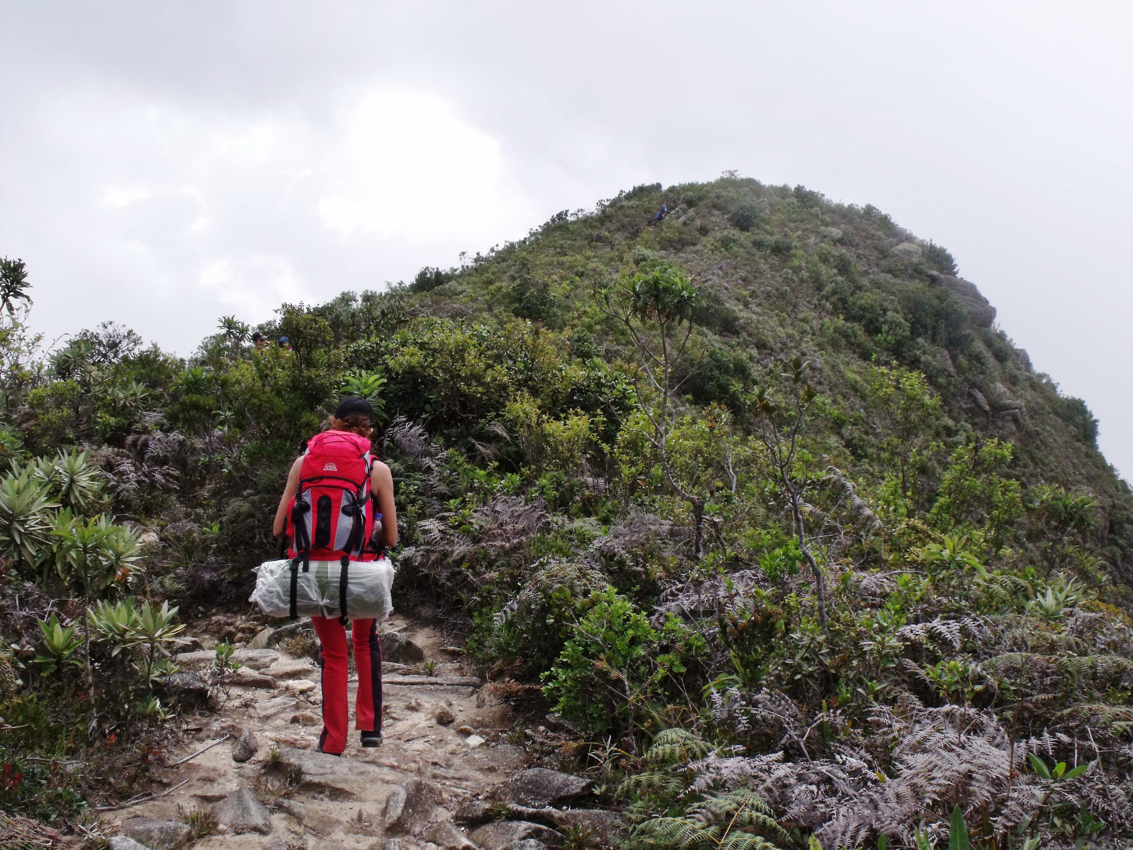 Sendero que conduce a Lagunazo (uno de los lugares donde más se acampa). Parque Waraira Repano (Ávila).